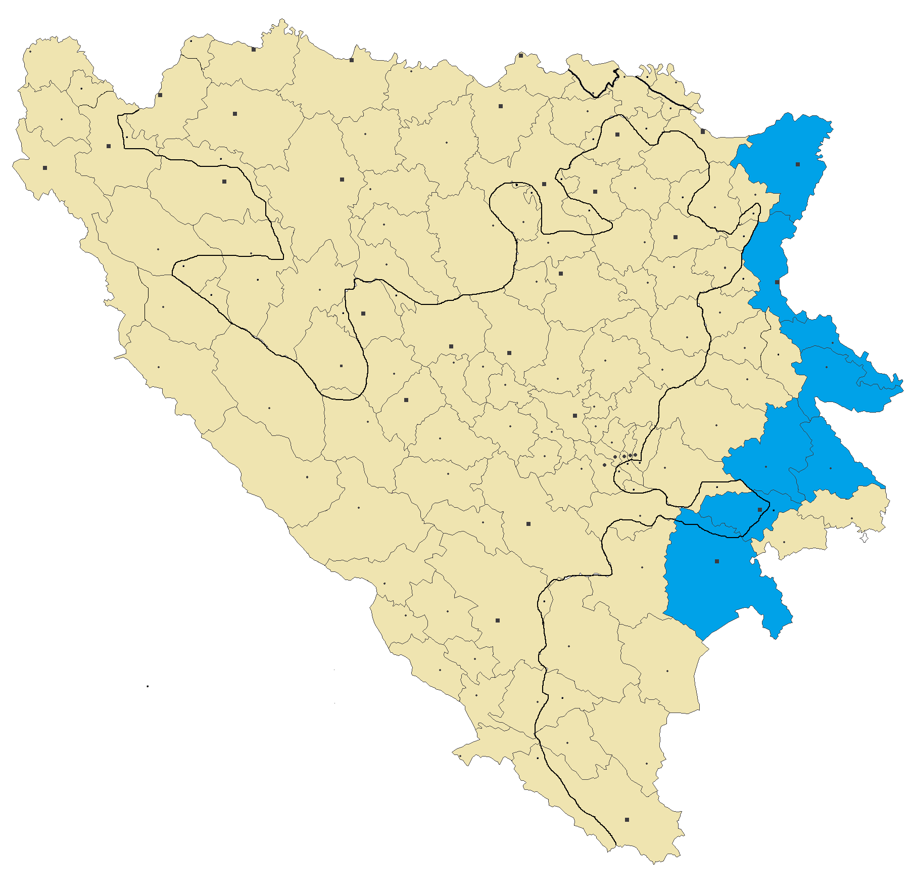 Подриње